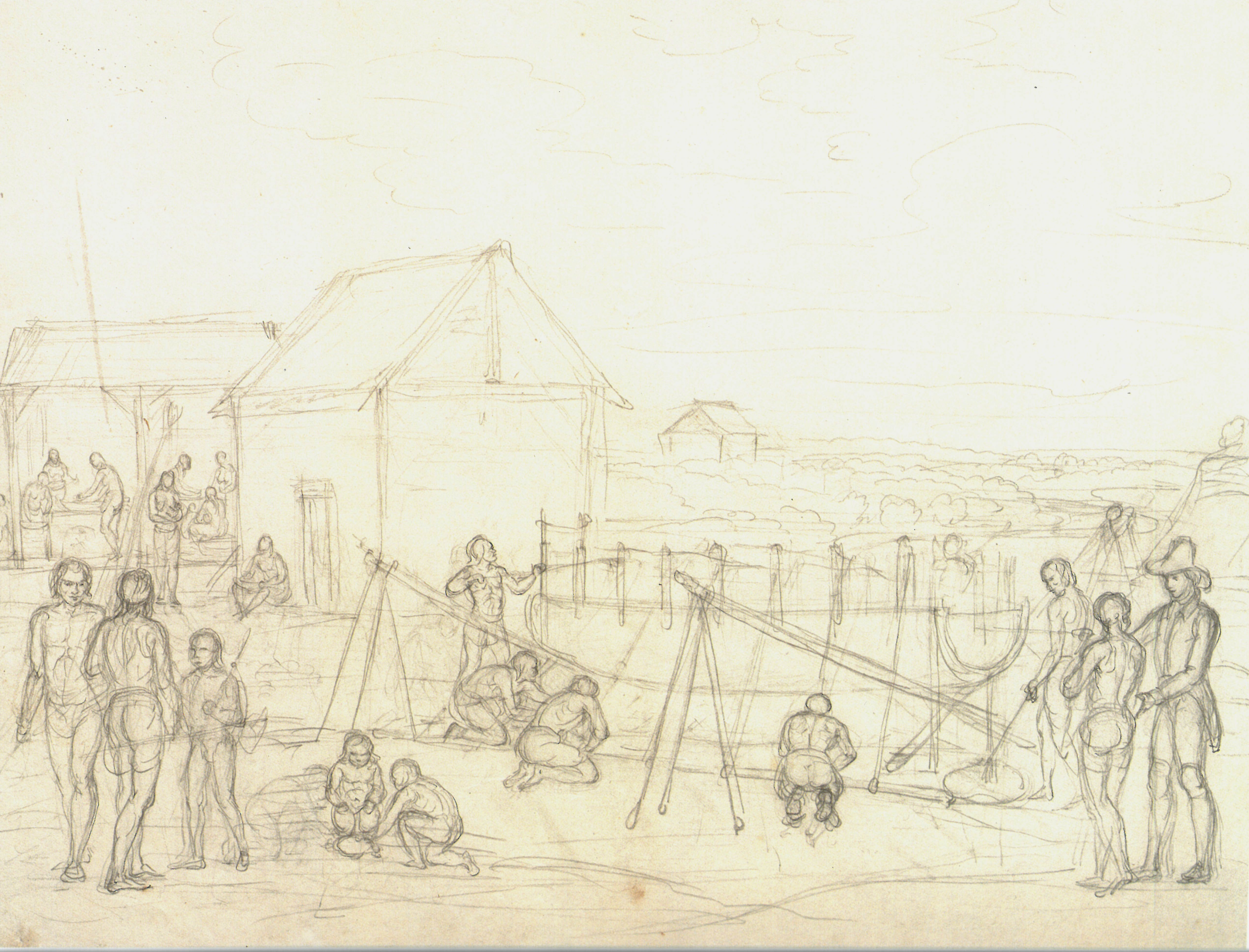 Skizze von Martius für die Abbildung "Porto dos Miranhos" im Reiseatlas Spix und Martius. Hier wurde ein neues Boot gebaut und Martius "erhielt" das indigene Mädchen Isabella (Miranha), das er nach München mitbrachte.